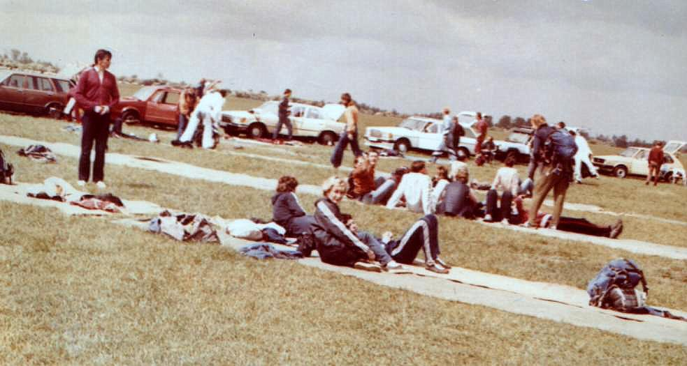 XV Spadochronowe Mistrzostwa Śląska Gliwice 1984, w czerwonej bluzie dresowej - Jan Isielenis – Sekcja Spadochronowa Aeroklubu Gliwickiego